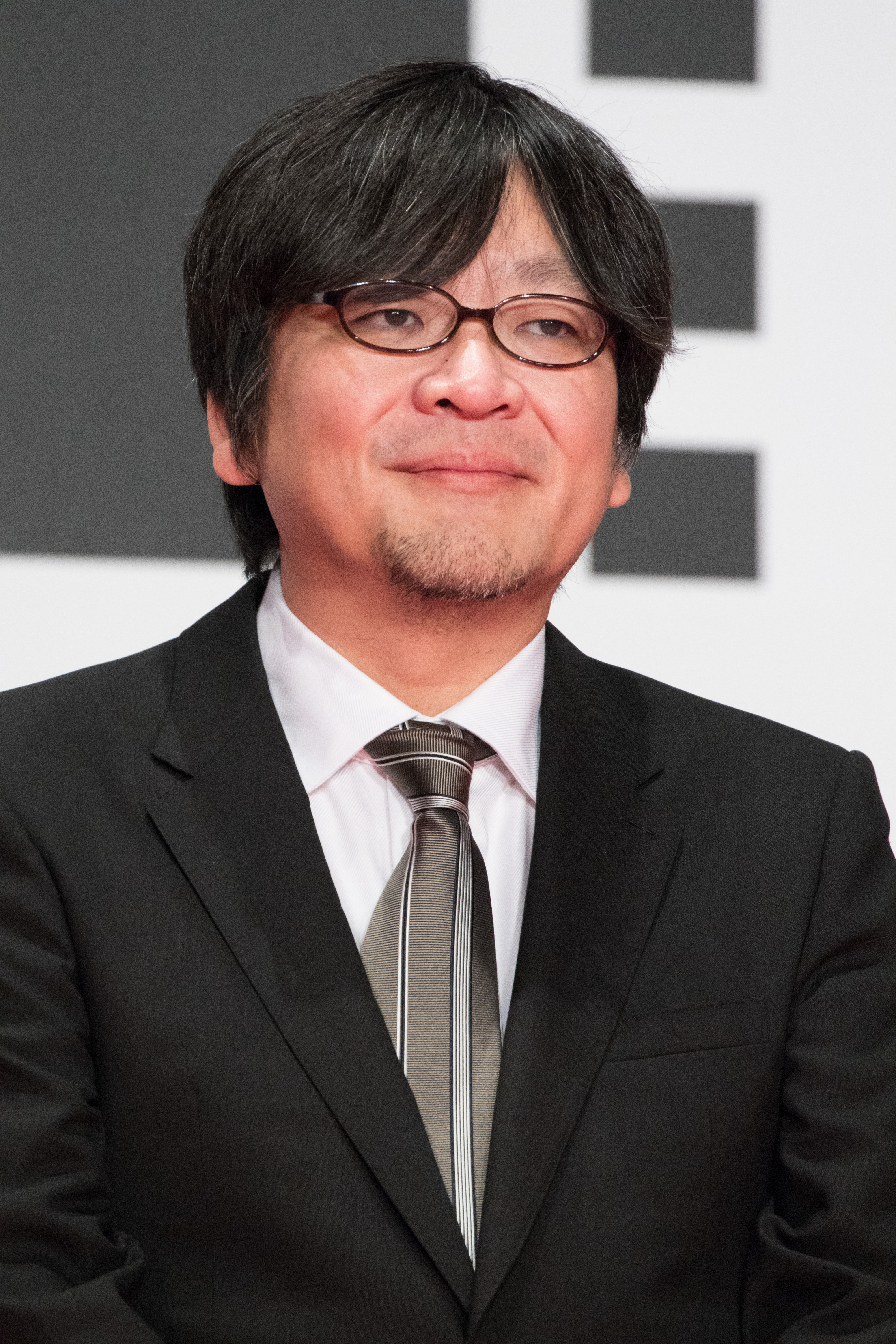 第29回 東京国際映画祭 オープニングセレモニー 細田守 (細田守の世界)